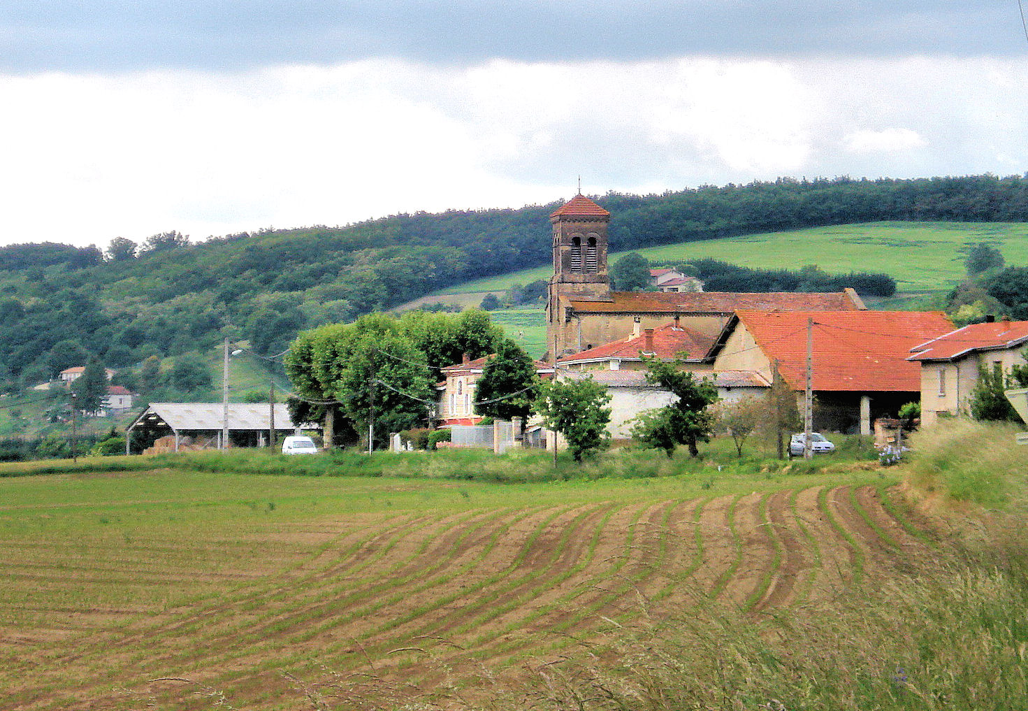 hameau de Treigneux à Hauterives, Drôme